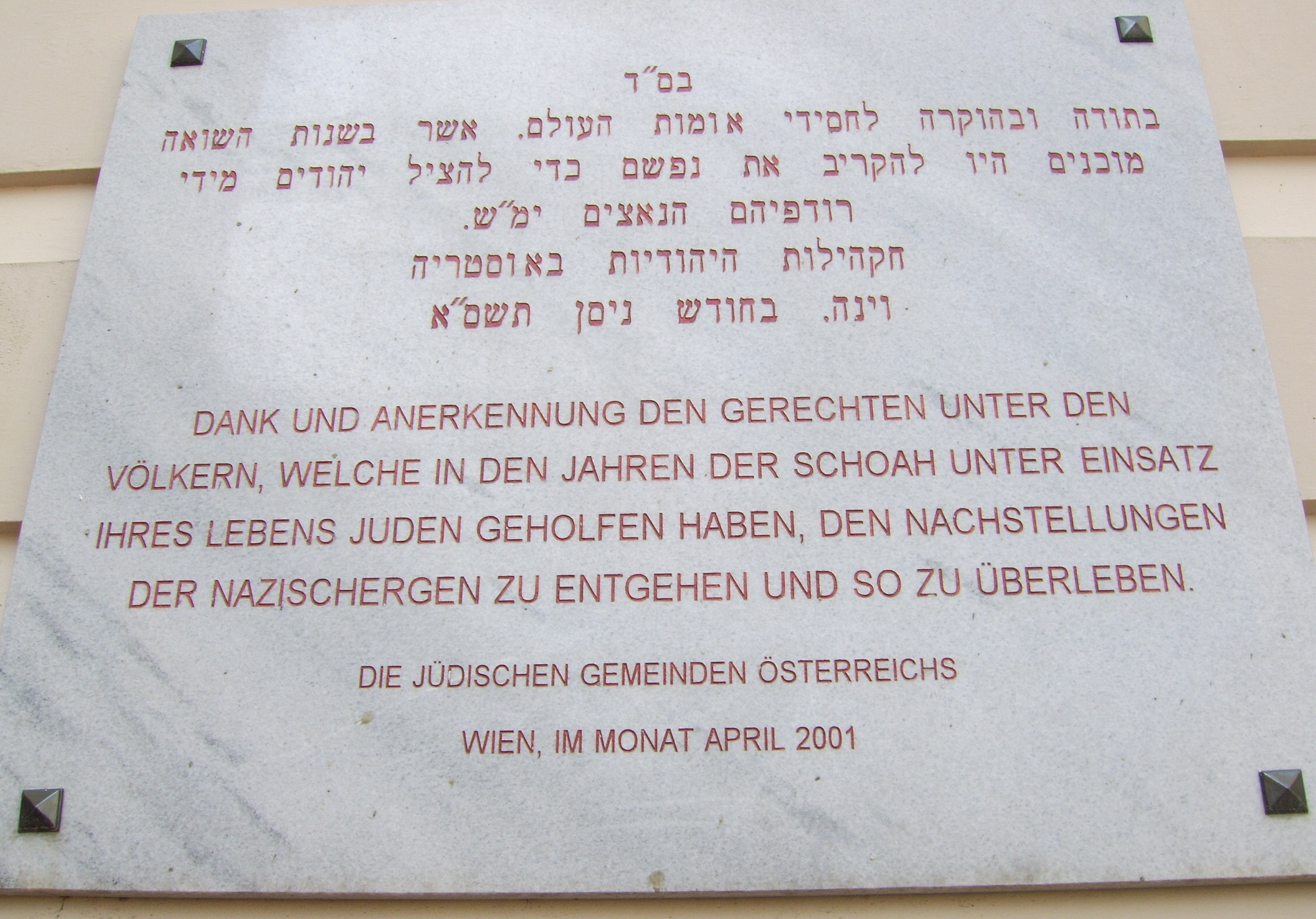 Museum Judenplatz, Misrachi-Haus, Author: Anima